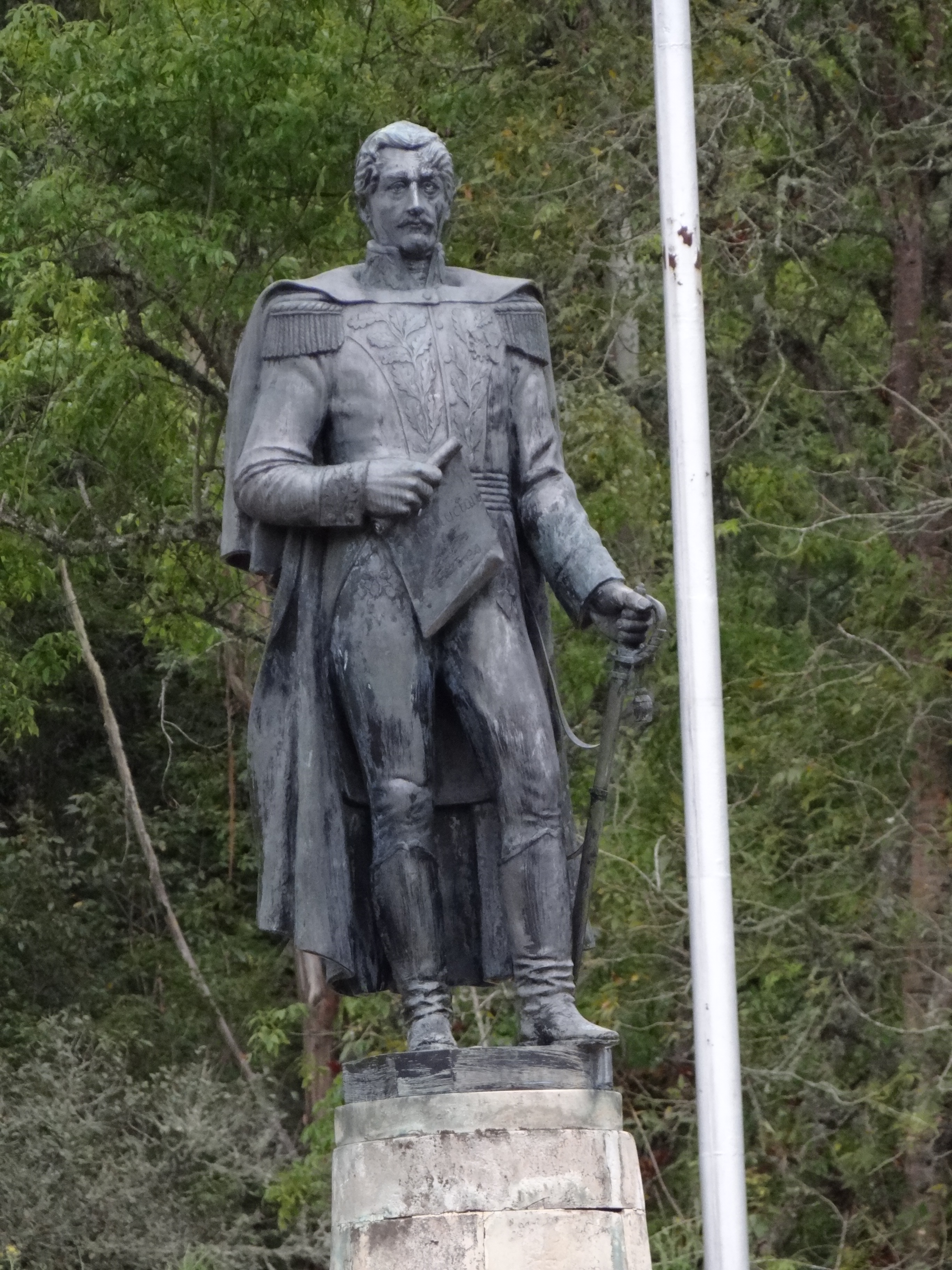 Estatua pedestre de Francisco de Paula Santander en el Puente de Boyaca